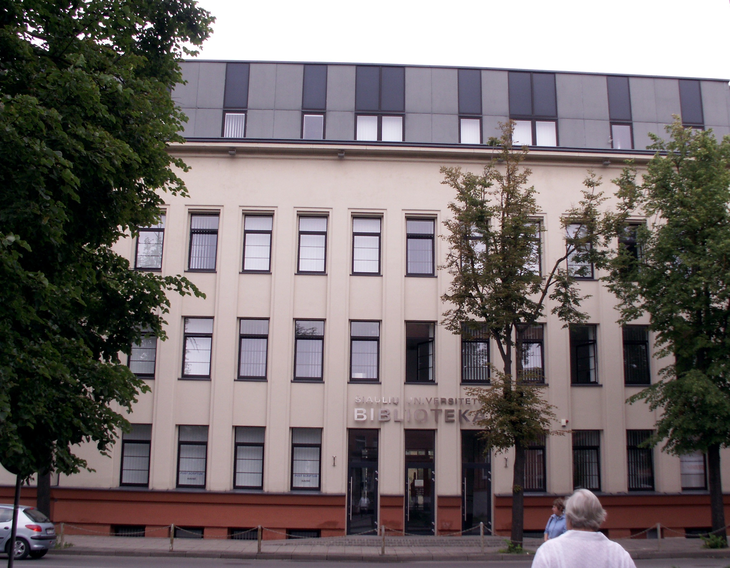 Šiaulių universiteto biblioteka